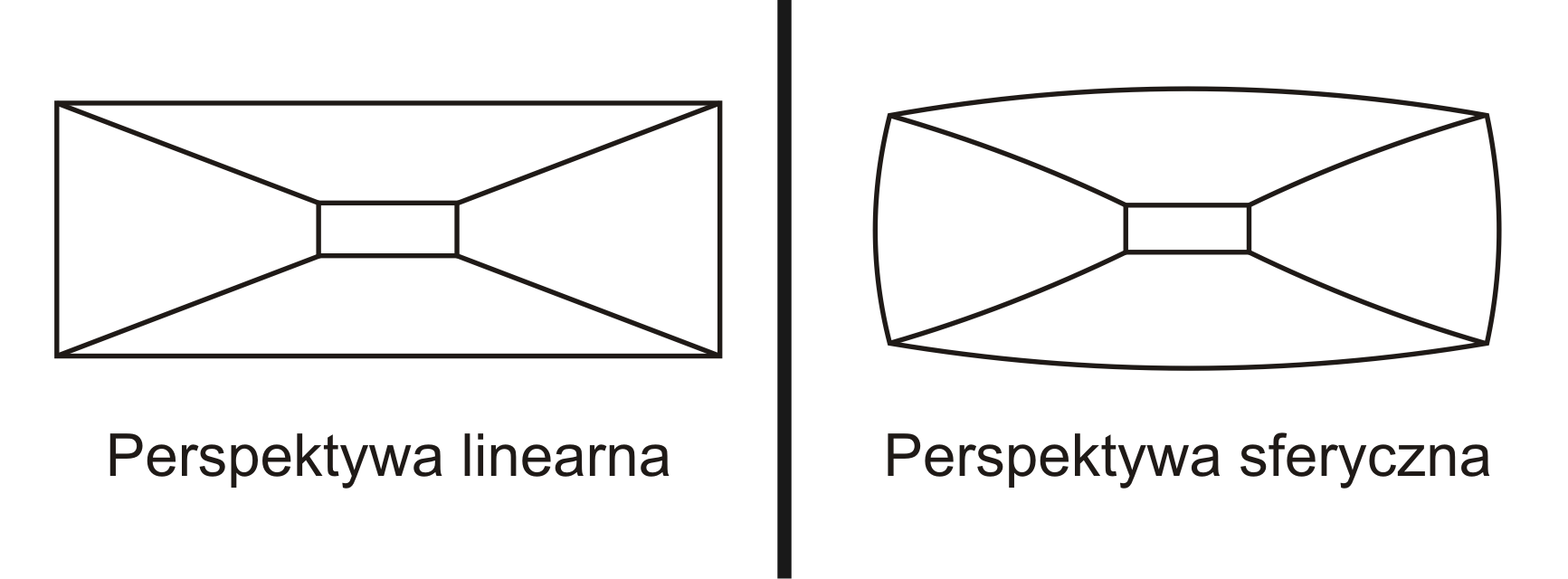 Korytarz w perspektywie linearnej i sferycznej